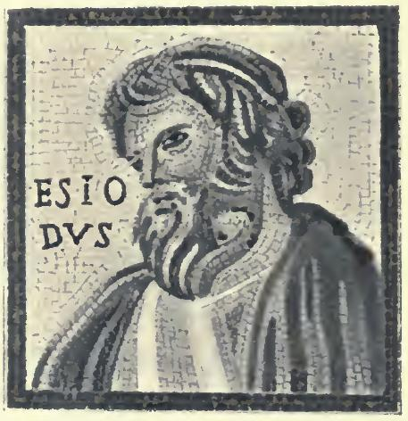 Das einzige noch erhaltene inschriftlich beglaubigte Bildnis von Hesiod auf dem Mosaik des Monnus in Trier